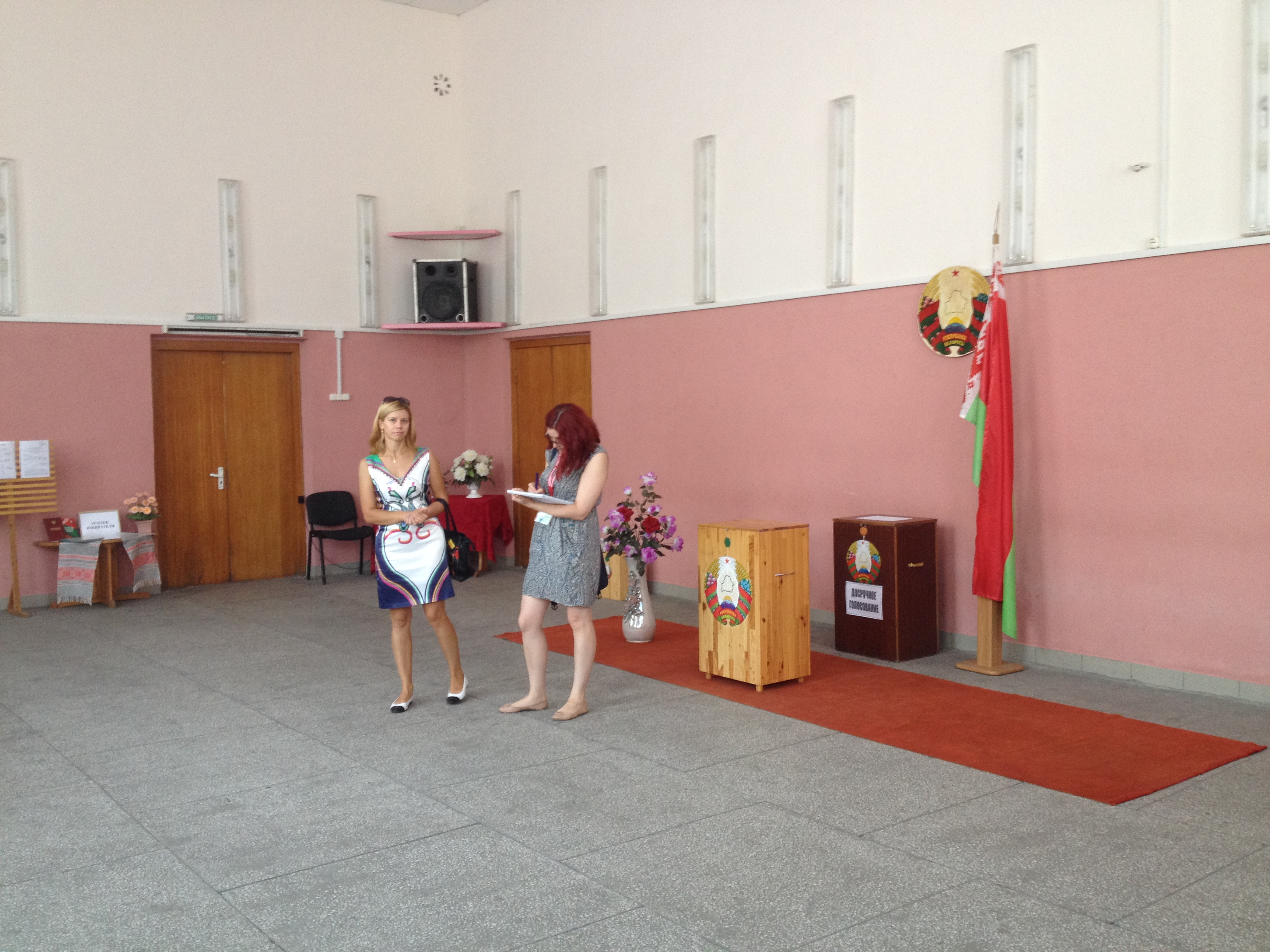 Wybory parlamentarne na Białorusi, 2017